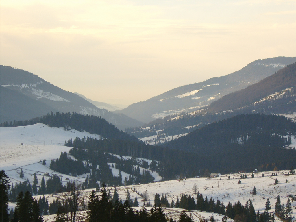 Piatra Fântânele, Tihuta.